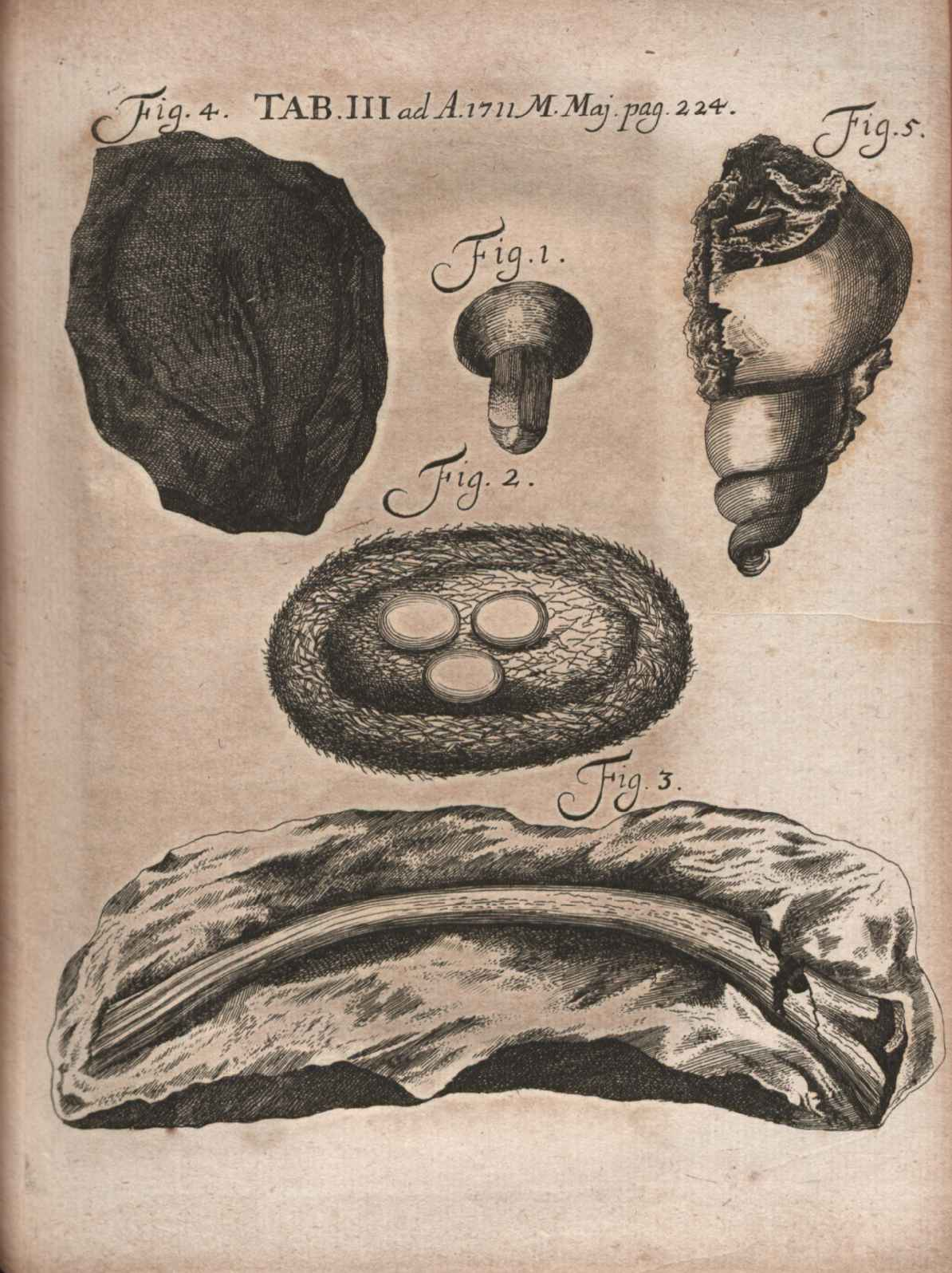 Illustration